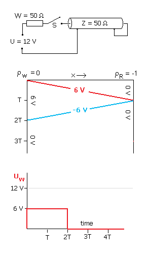 Lattice-Diagram (Impulsfahrplan) und Oszillogramm der Spannung am Anfang (rot) einer am Ende kurzgeschlossenen Koaxleitung (Reflexionsfaktor = -1). Eingespeist wird ein Spannungssprung von 0 V auf 12 V aus einer Quelle mit Innenwiderstand 50 Ohm. Im mittleren Bild ist der Ort des Sprunges (hor. Achse) als Funktion der Zeit (vertikale Achse) eingezeichnet.